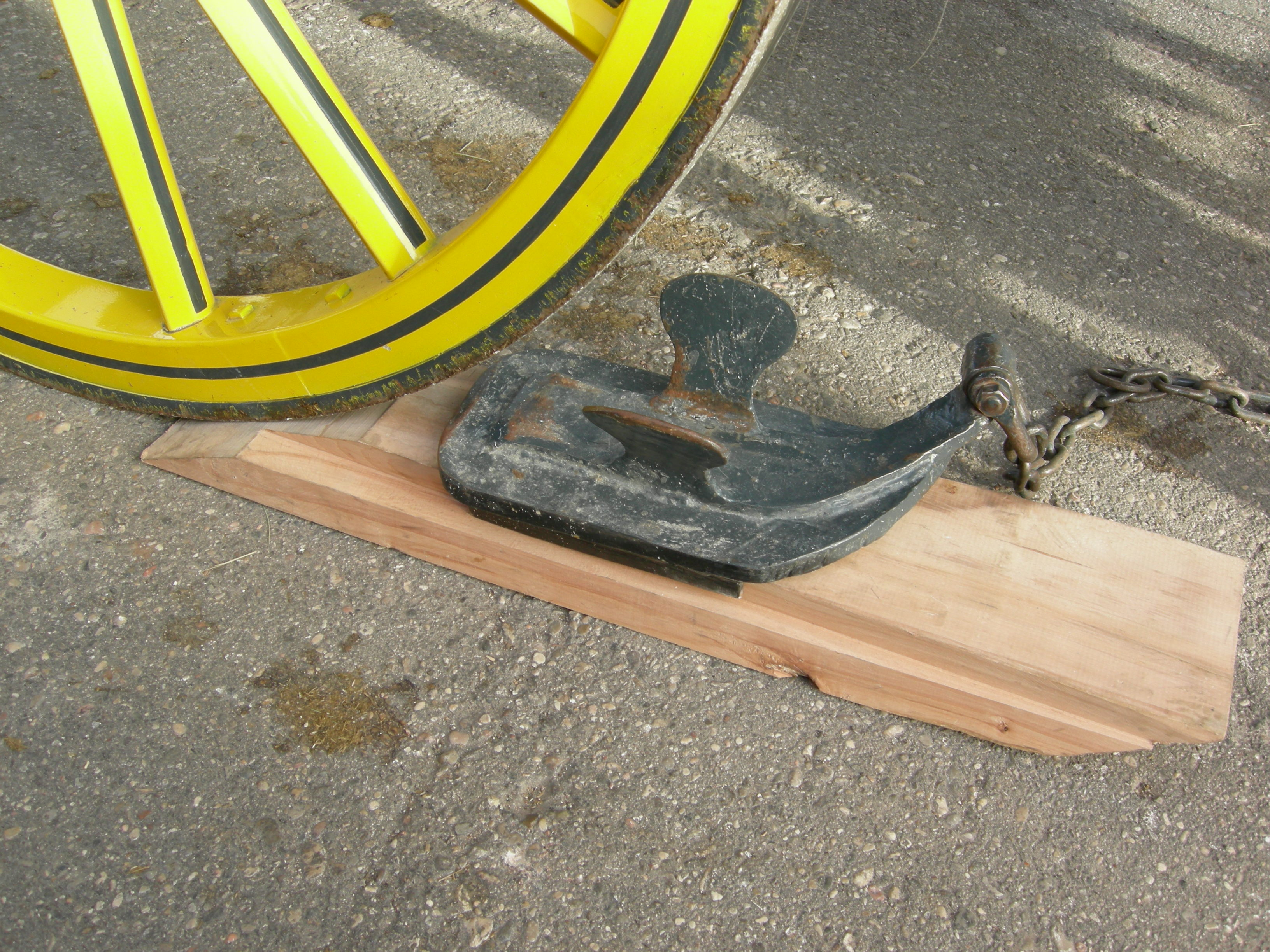 Vorgelegter Hemmschuh mit Birkenholzkeil vor dem rechten Hinterrad einer Postkutsche